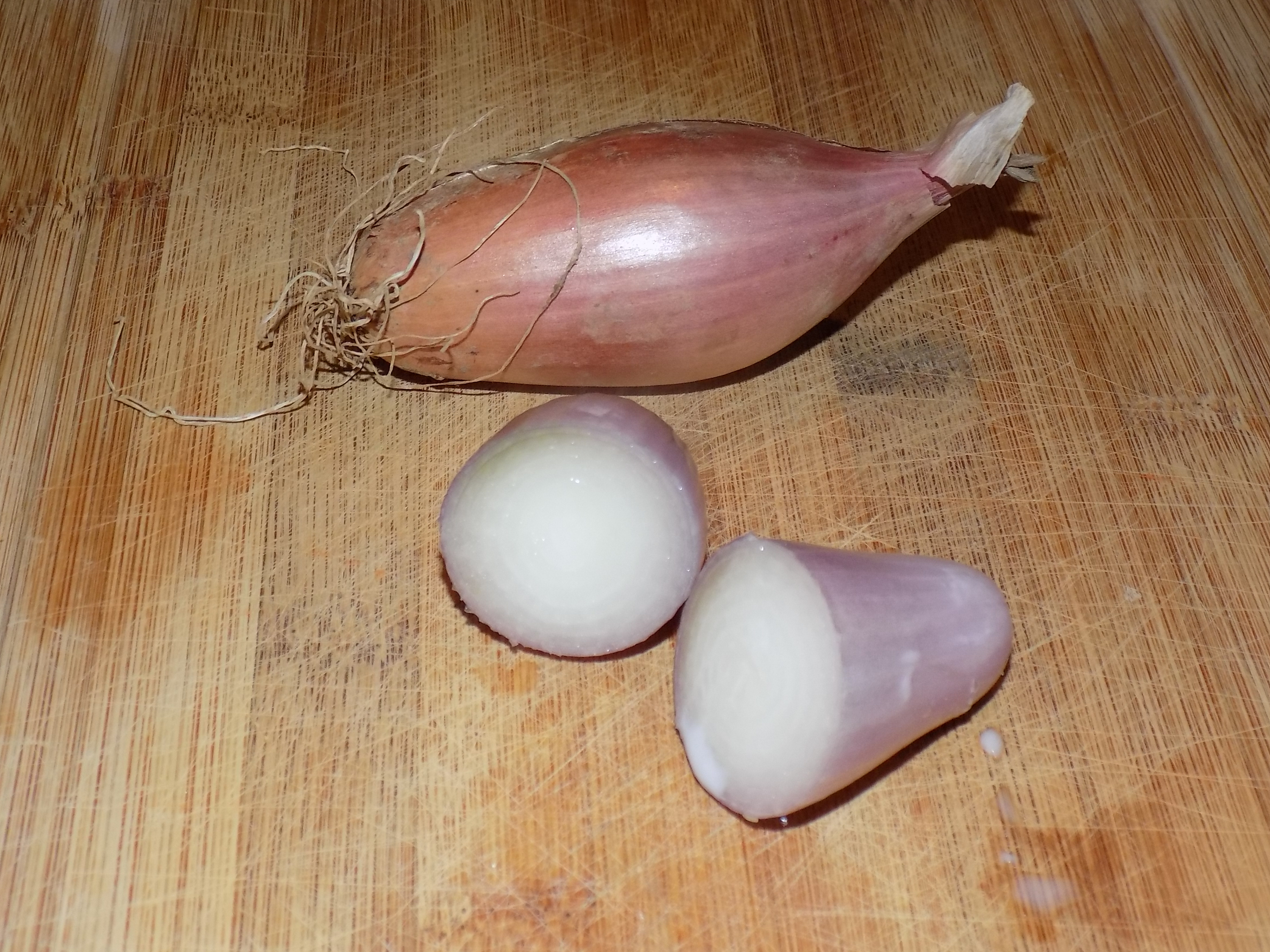 Un échalion entier et un échalion coupé en deux.